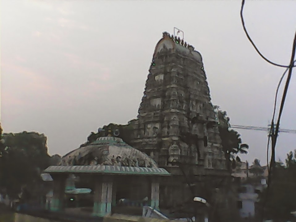 శ్రీ సాక్షి భావన్నారాయణ స్వాిమి వారి దేవాలయ గాలి గోపురంి్